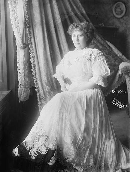 Johanna Gadski (1872 - 1932), German opera singer, soprano